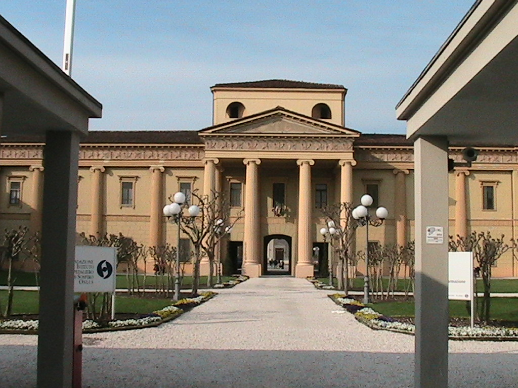 Sospiro - Palazzo Cattaneo Ala Ponzone